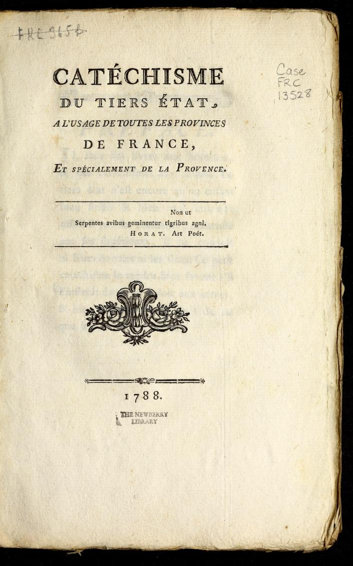 Catechisme d'Antonelle